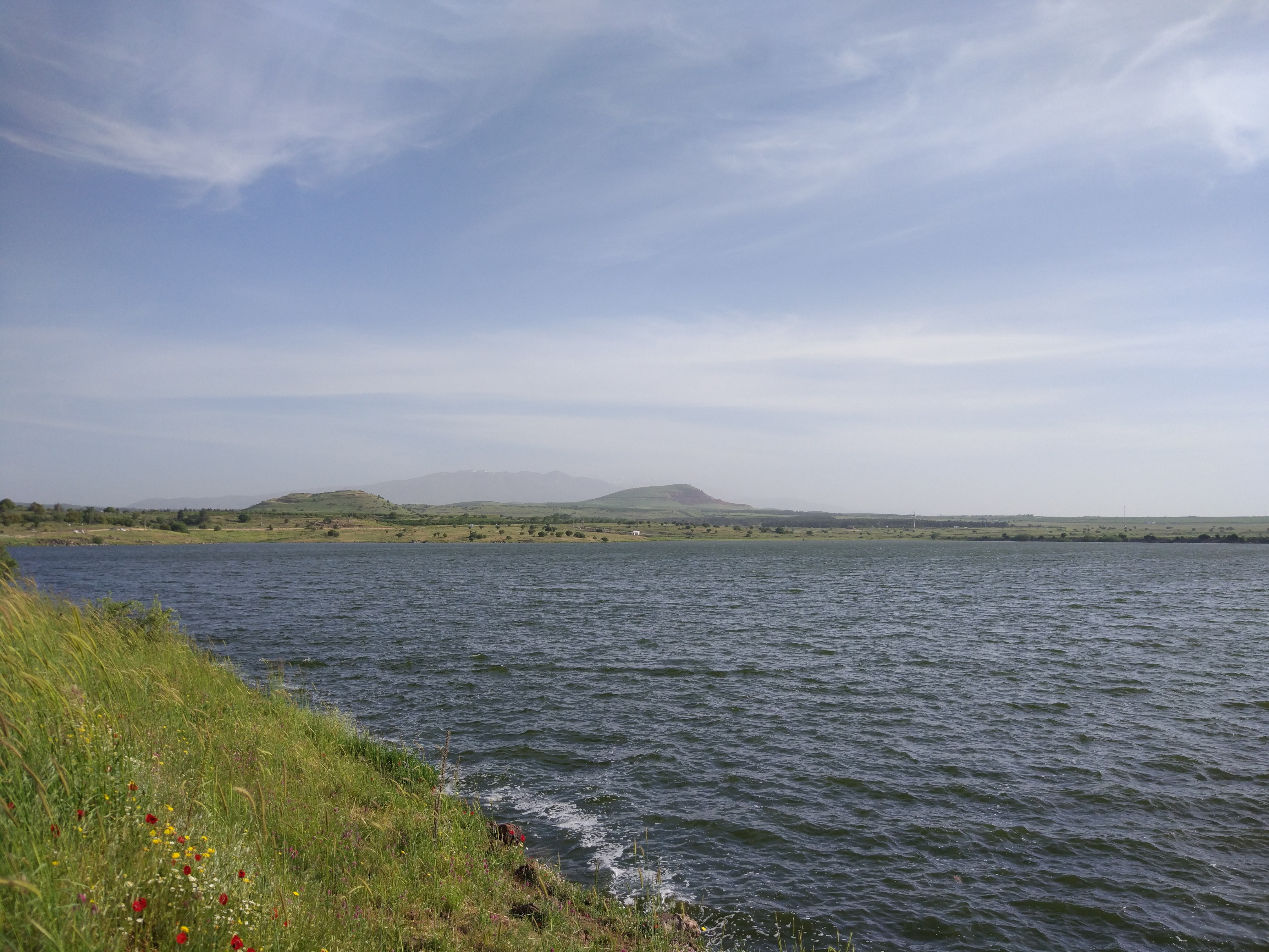 מאגר בנטל באפריל 2017. ברקע משמאל הר בראון ובמרכז הר חרמונית